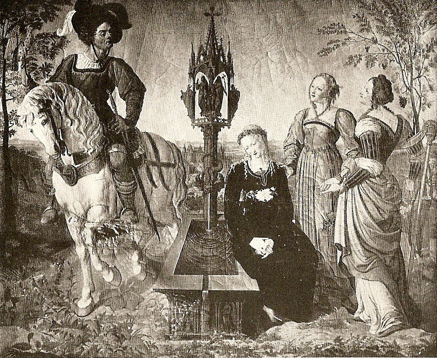 Gemälde Scheiden der Ritterzeit des Malers Josef Wintergerst; das Bild war 1932 in Privatbesitz in Dessau